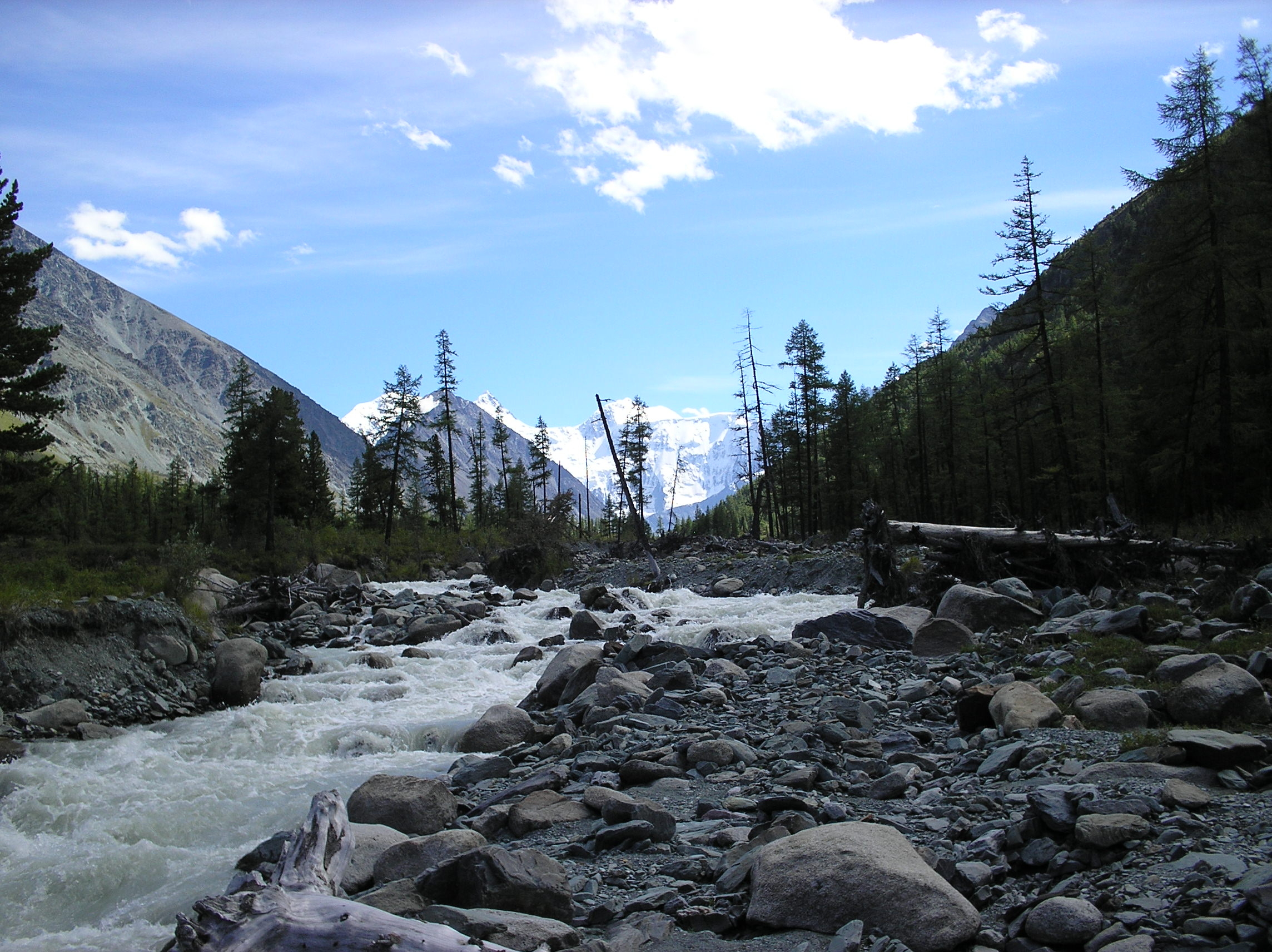 Вид на гору Белуху. Алтай This is an image of the Biosphere Reserve or a Geopark: Altai Nature Reserve